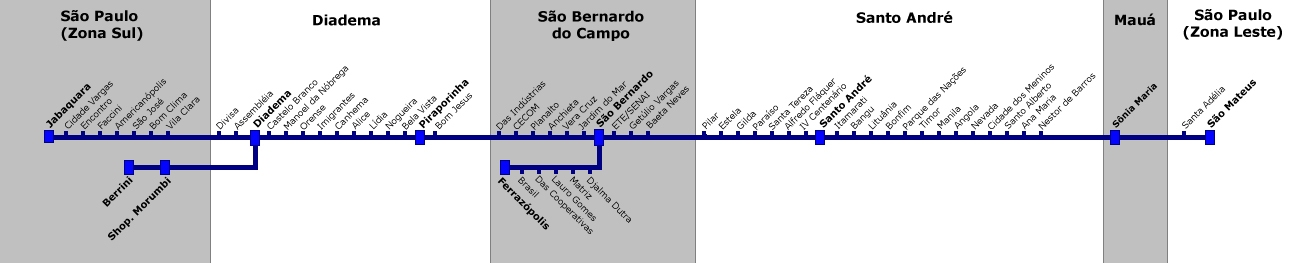 Corredor EMTU